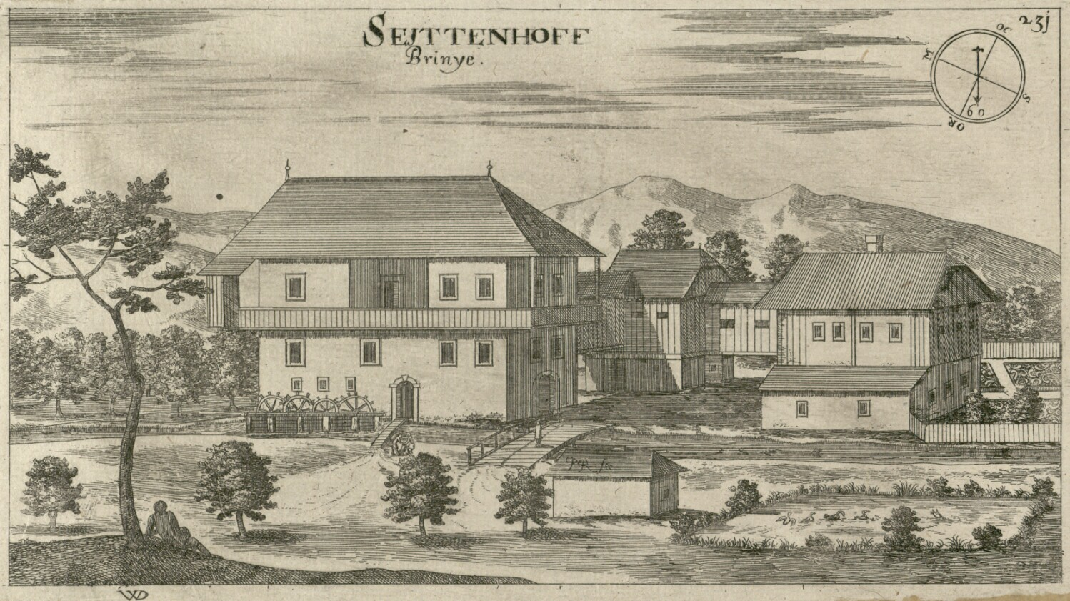 Dvorec Brinje